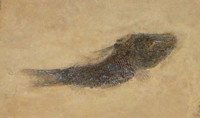 Fossil of Legnonotus, an extinct fish- Took the picture at Museo di Scienze Naturali, Bergamo